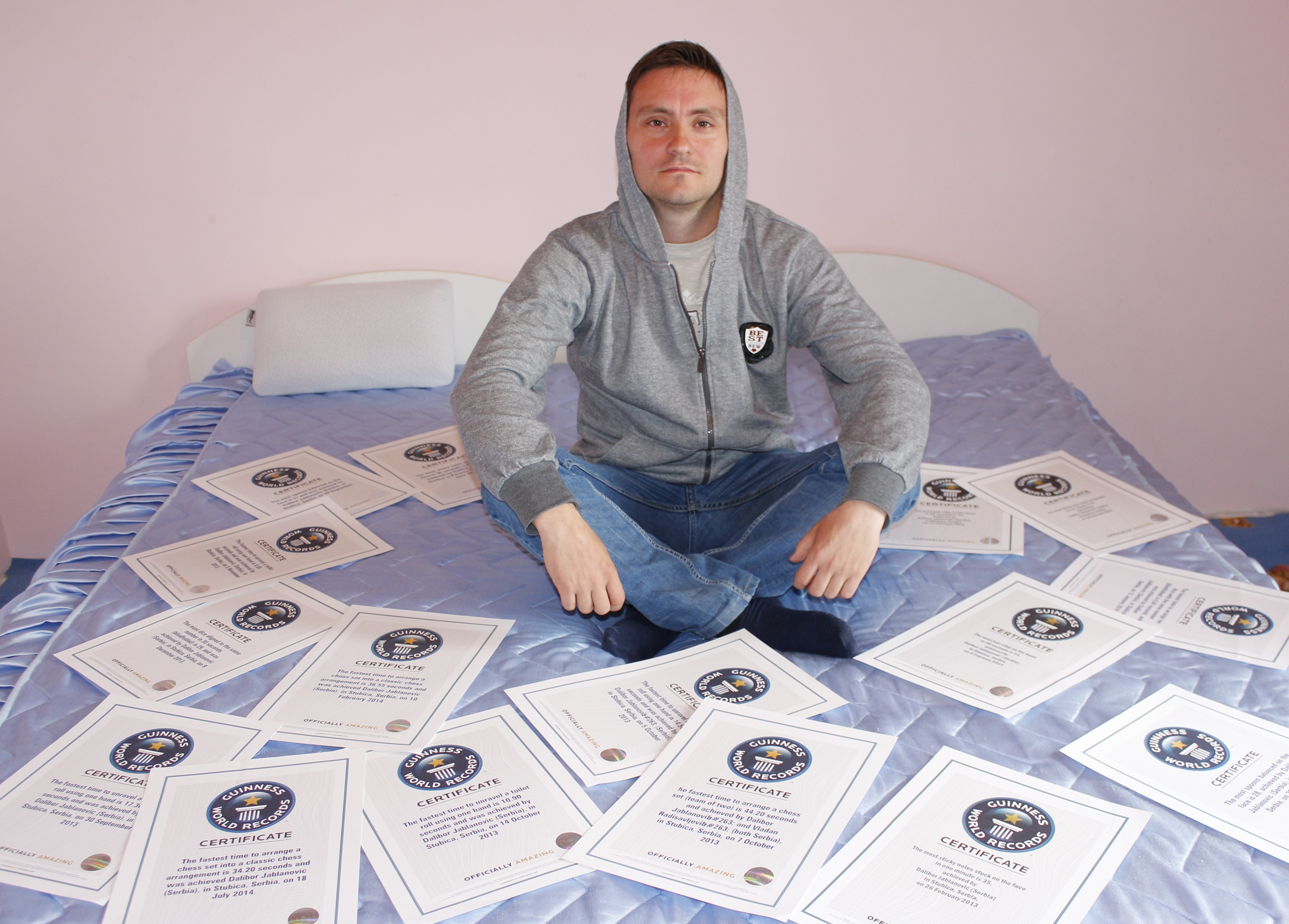 radi ulepsavanja stranice